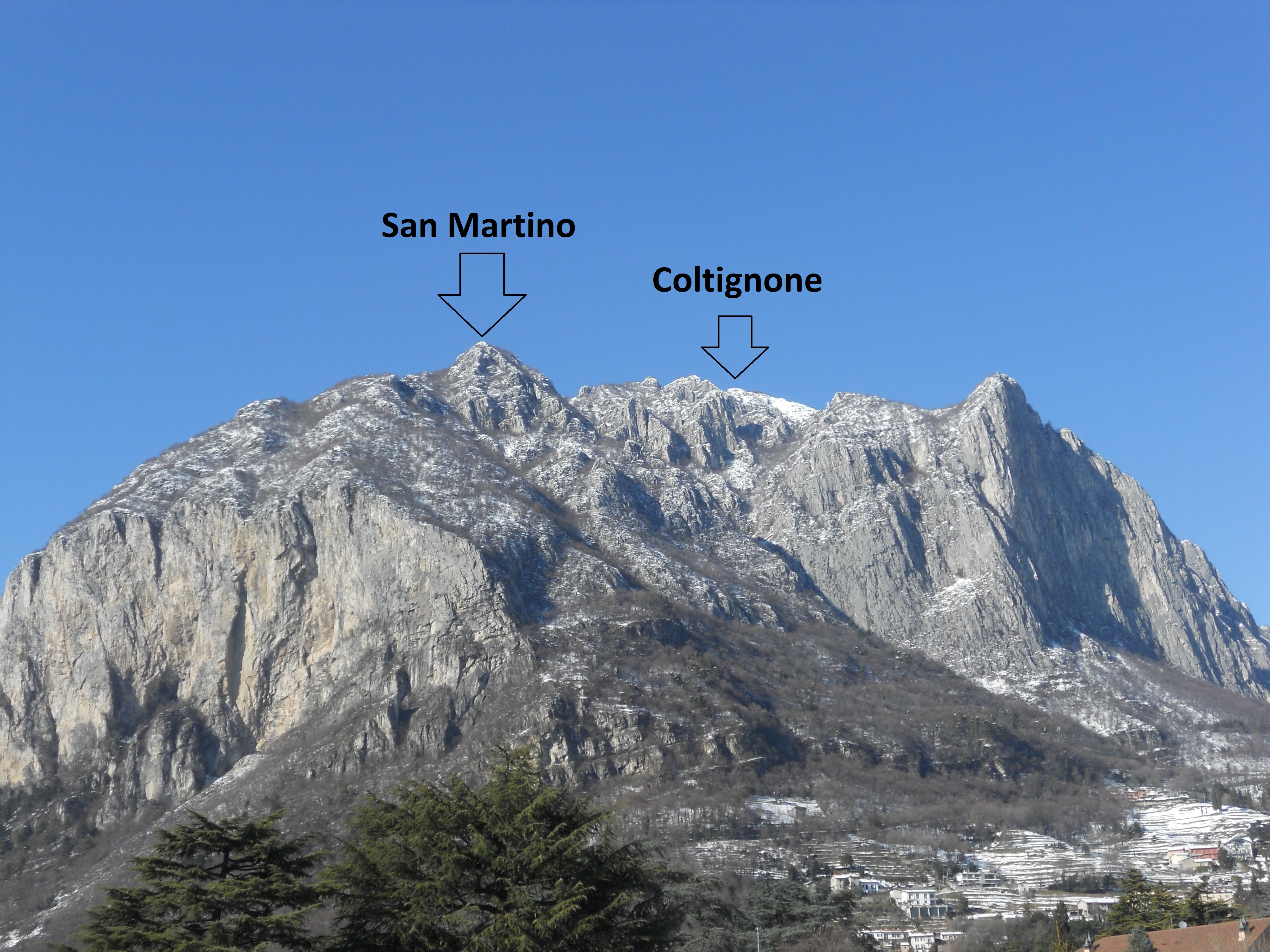 I due monti che sovrastano la città di Lecco